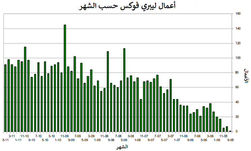 رسمٌ بياني للأعمال المُنتجة من قِبل ليبري ڤوكس في الشهر، بما في ذلك شهر أيَّار (مايو) من سنة 2011م، استنادًا إلى هذه البيانات.